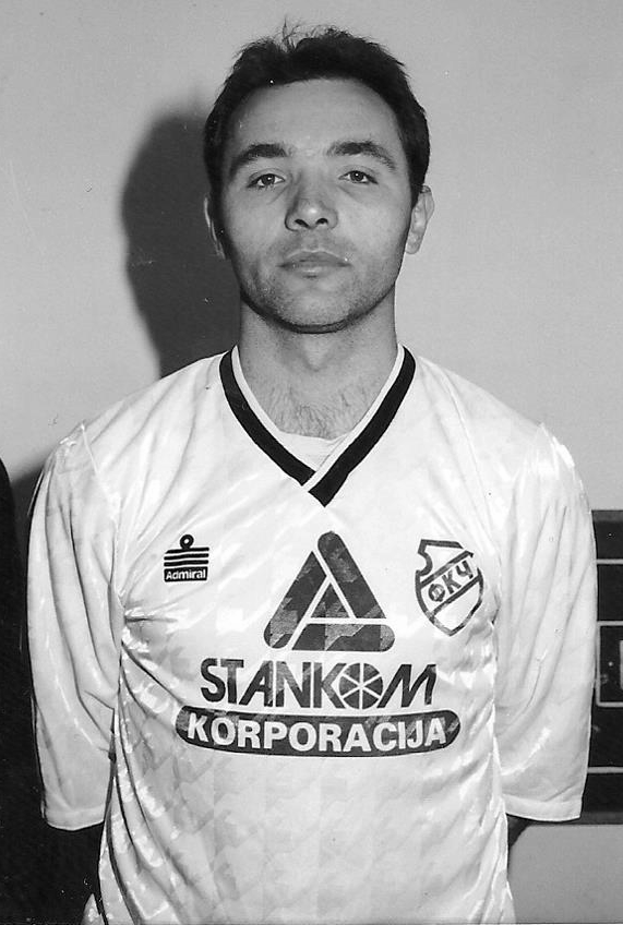 Srpskohrvatski / српскохрватски: Nenad Nikolić